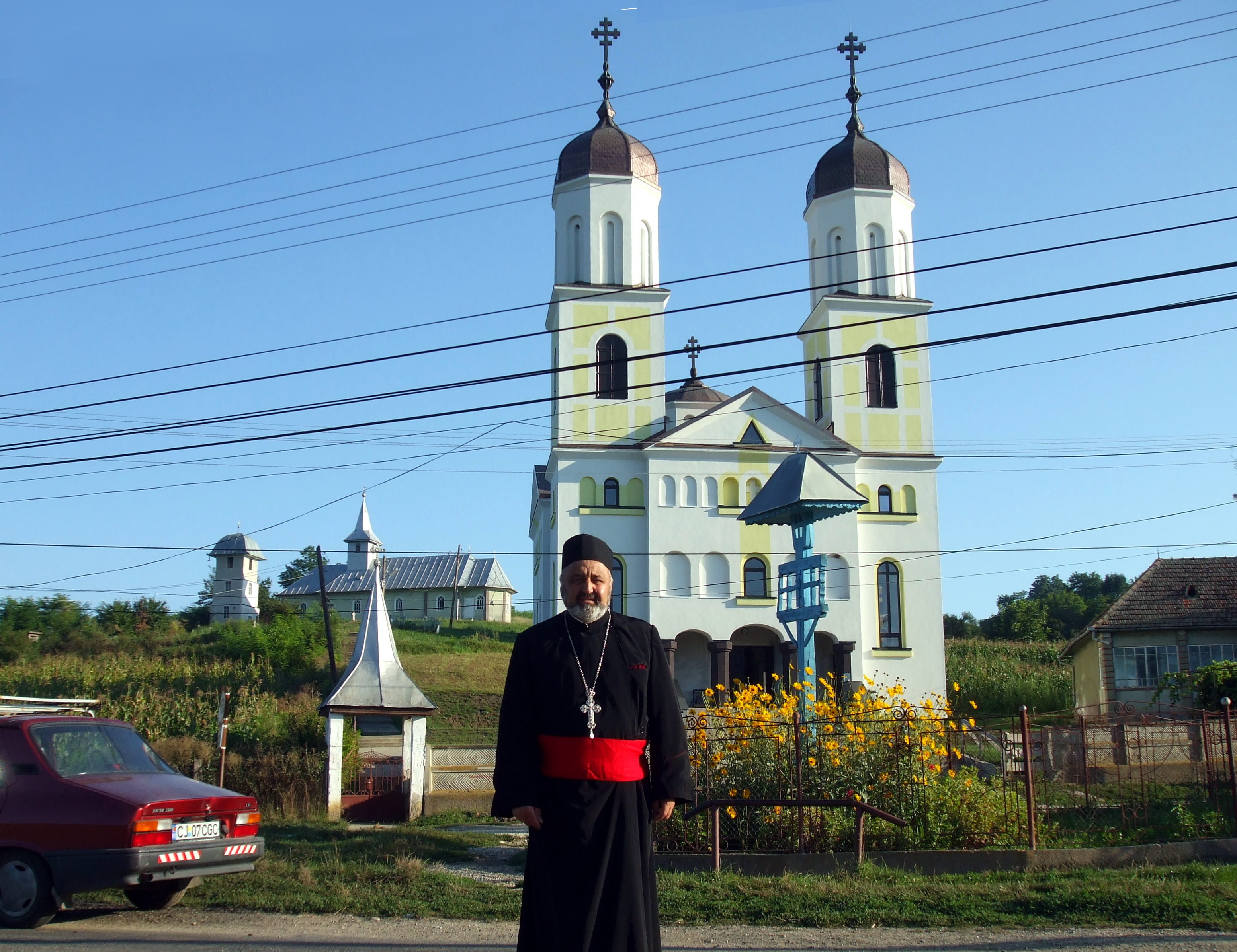 Preotul ortodox Nicole Pașca din Soporu de Câmpie - ctitor a doua lacașe de cult , respectiv Mănăstirea Sfâinta Treime în 1992 și Noua Biserica ortodoxă finalizată în 2009